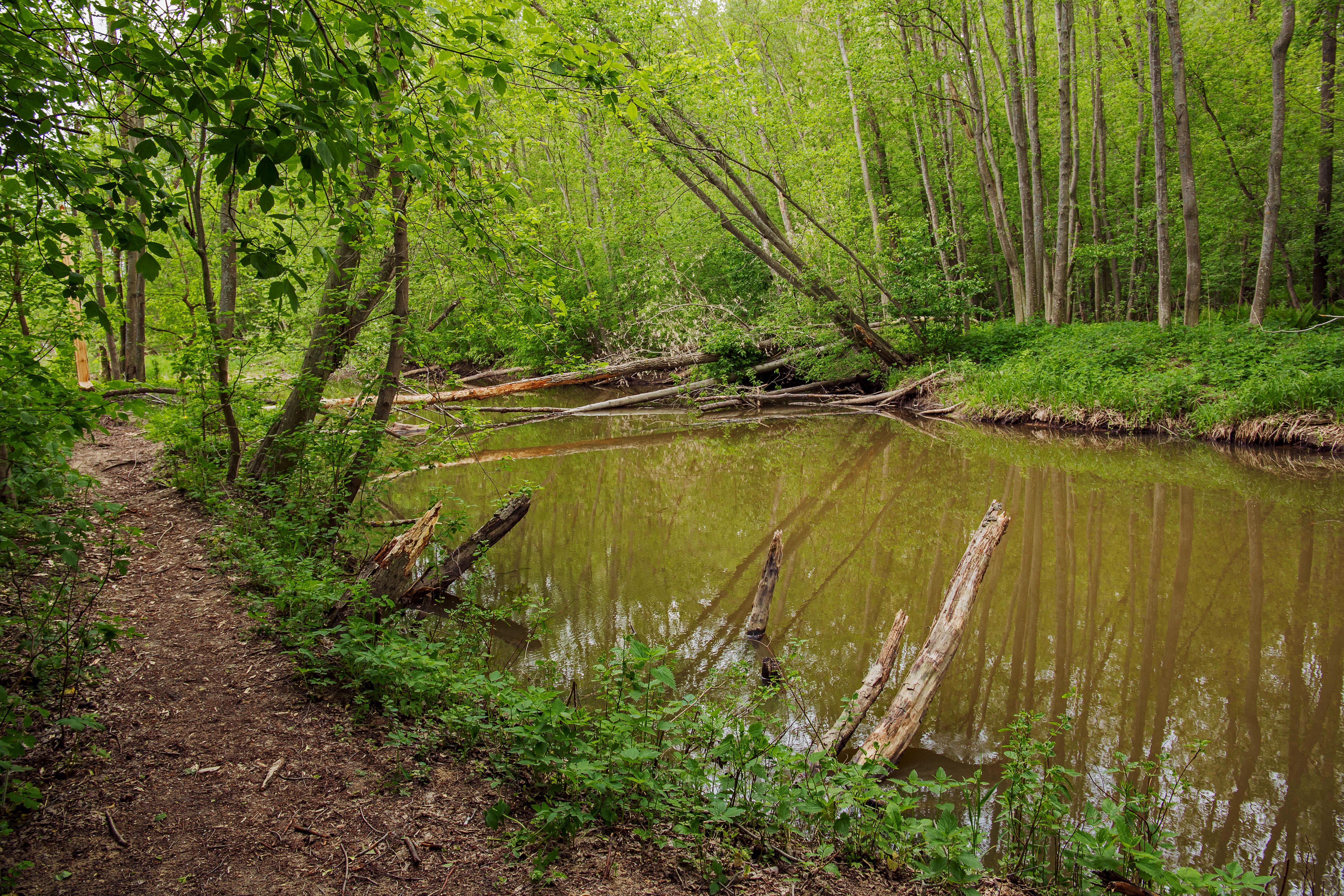 Волжско-Камский заповедник: Зеленодольский район, Татарстан This image is related to the protected area of Russia number 1600082